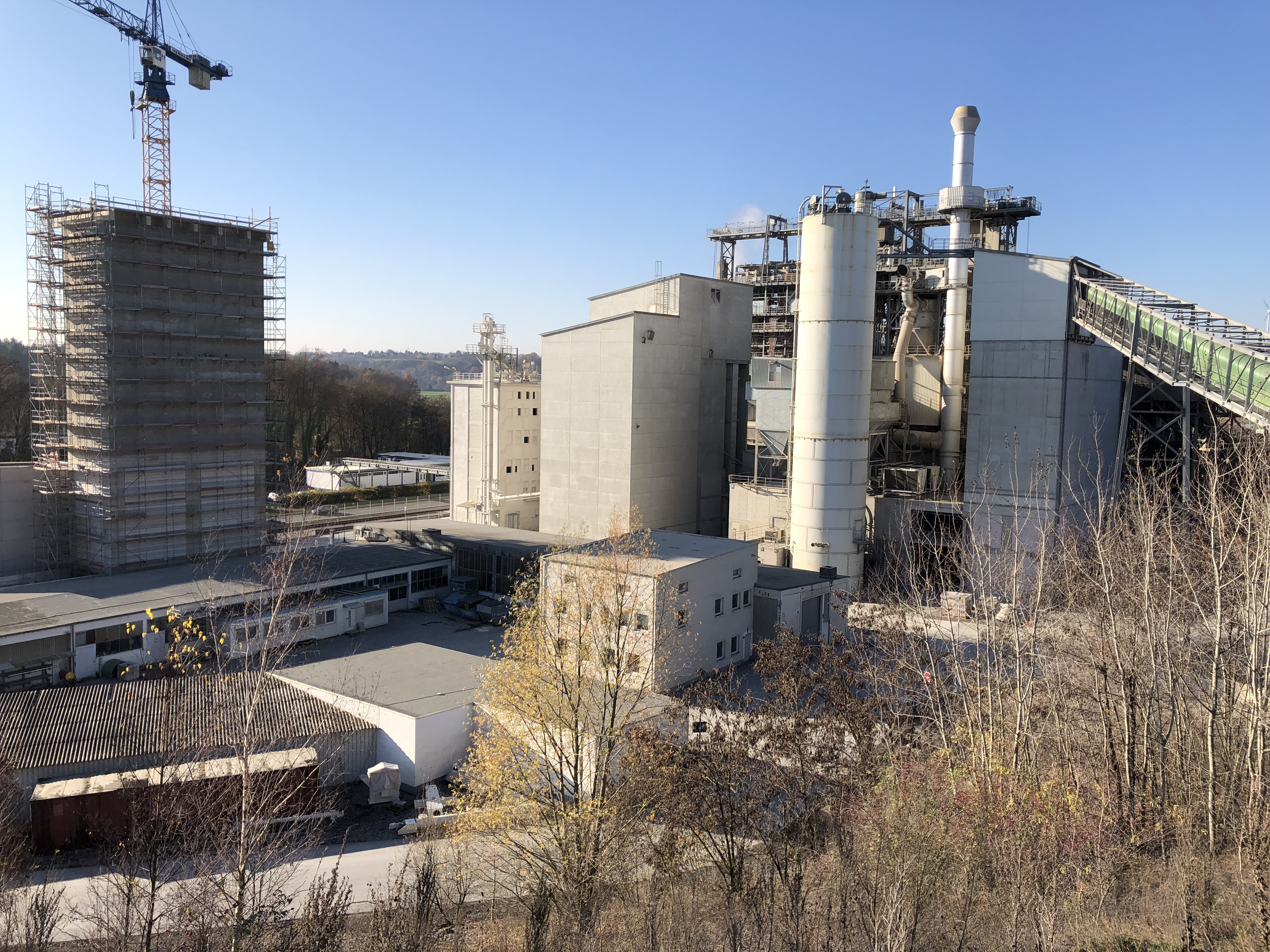 Die Kalkwerksanlage zwischen den Gemeinden Steeden und Dehrn mit ihren Brennöfen, der Stückkalkverladeanlage im Bau und rechts dem Förderband zur Materialversorgung aus dem Steinbruch.